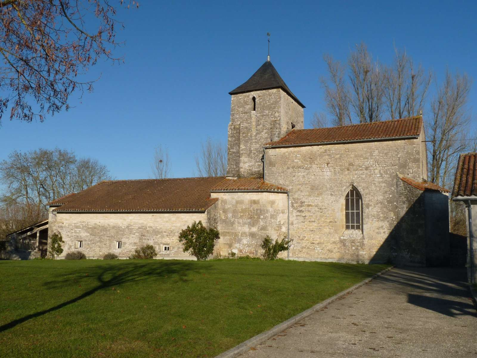 église de Juillé, Charente, France